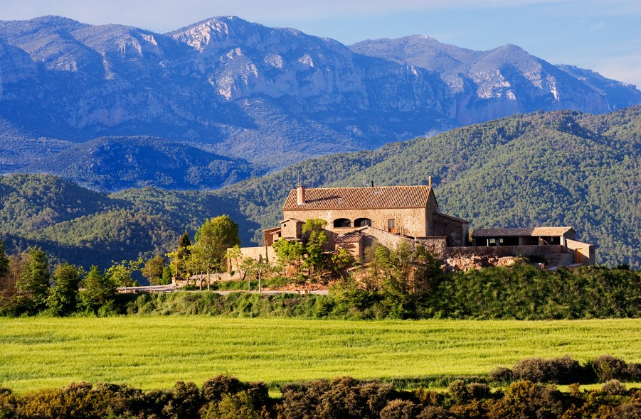 Masia típica catalana de Heretat de Guàrdia, en el municipio de La Baronia de Rialb (Prepirineo catalán).